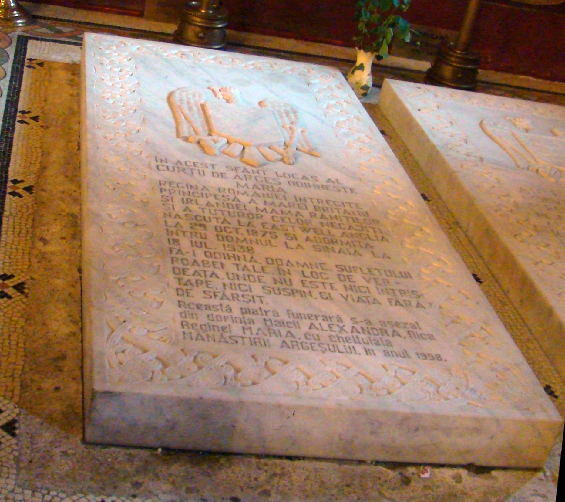 Biserica Episcopală "Adormirea Maicii Domnului", mormântul reginei Maria 01